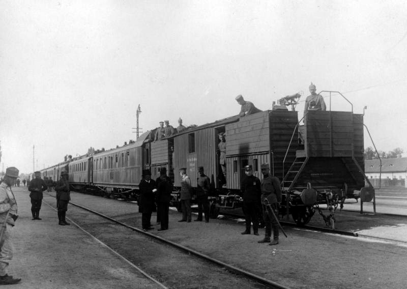 Der kaiserliche Sonderzug. Wilhelm II. in Hermannstadt.